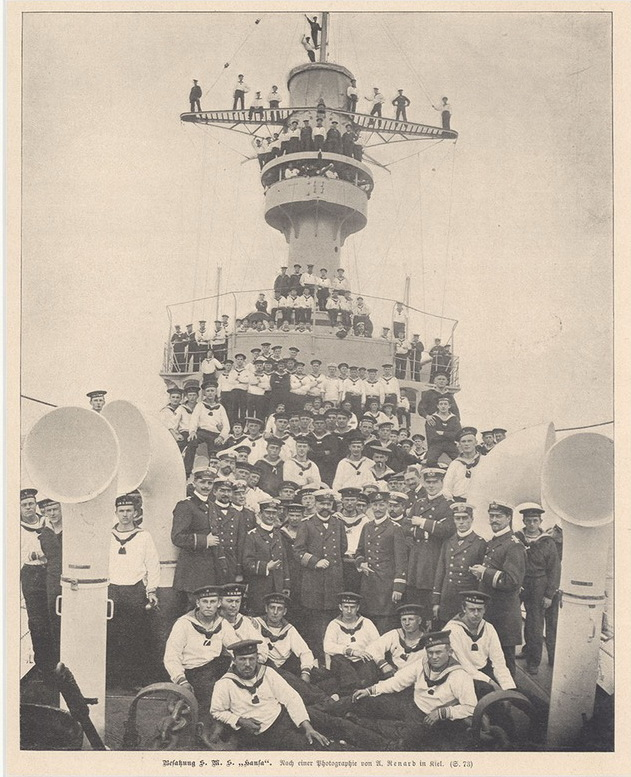 Besatzung der S. M. S. Hansa, nach einer Photographie von A. Renard in Kiel